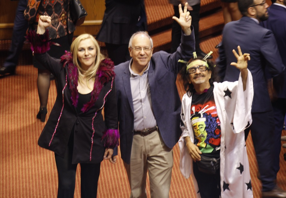 Día de la asunción diputacional